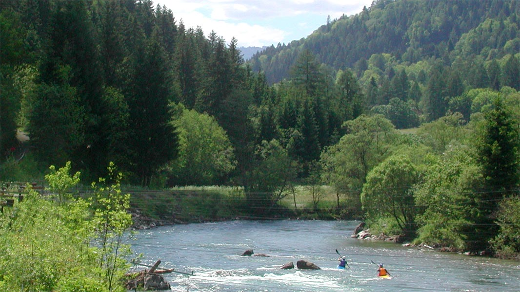 Die Mur bei St. Ruprecht ob Murau in der Nähe des Holzmuseums